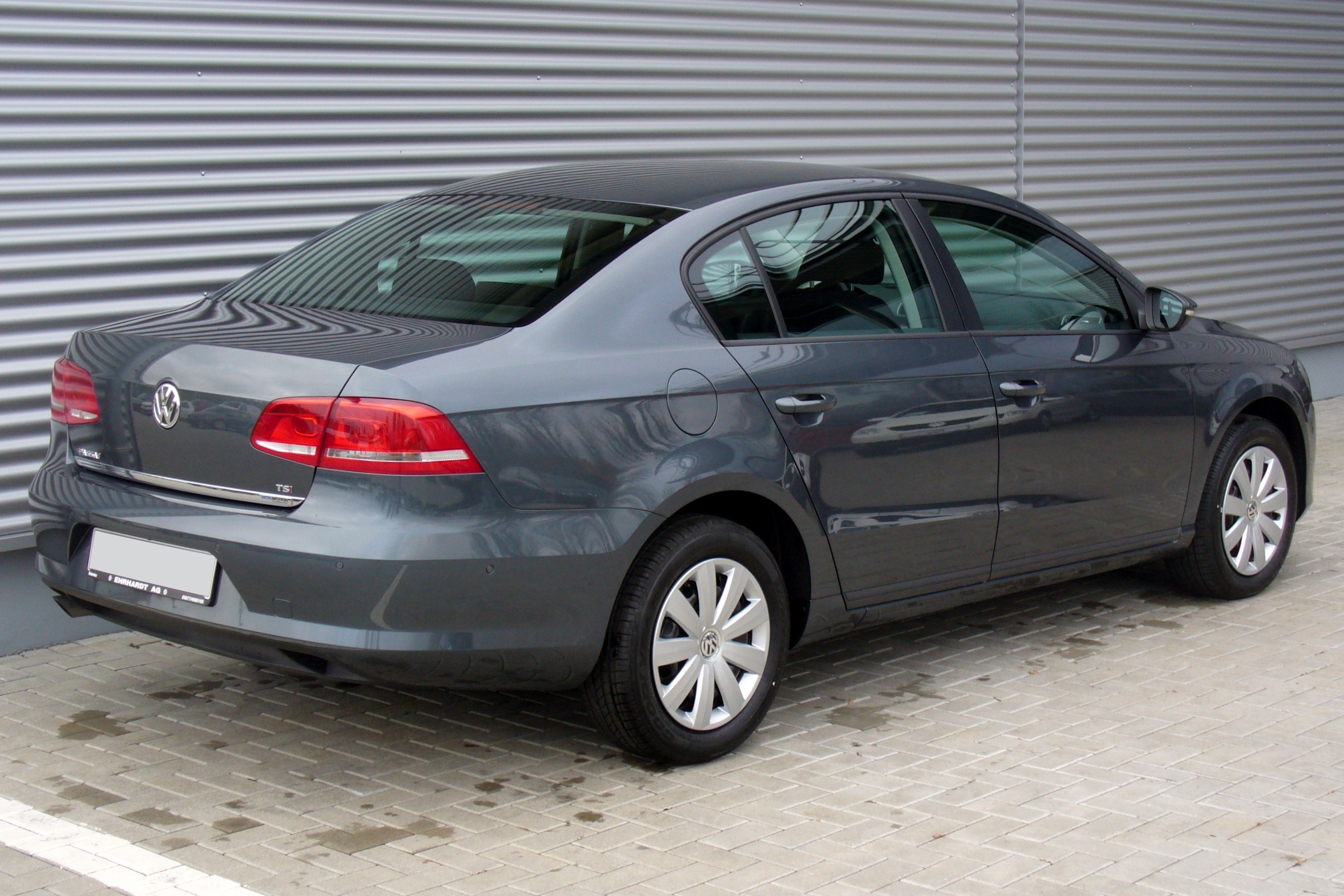 VW Passat B7